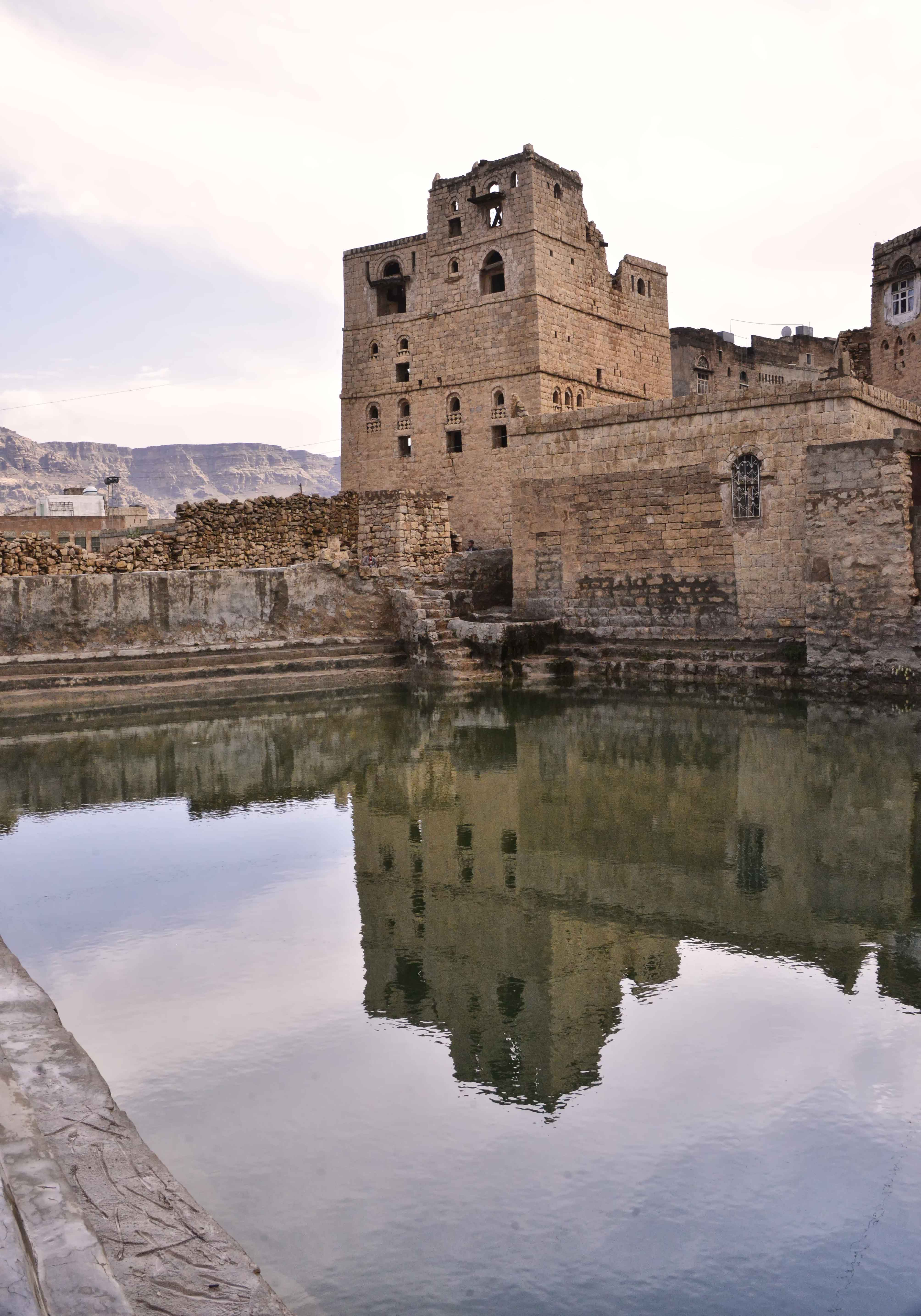 Yemen